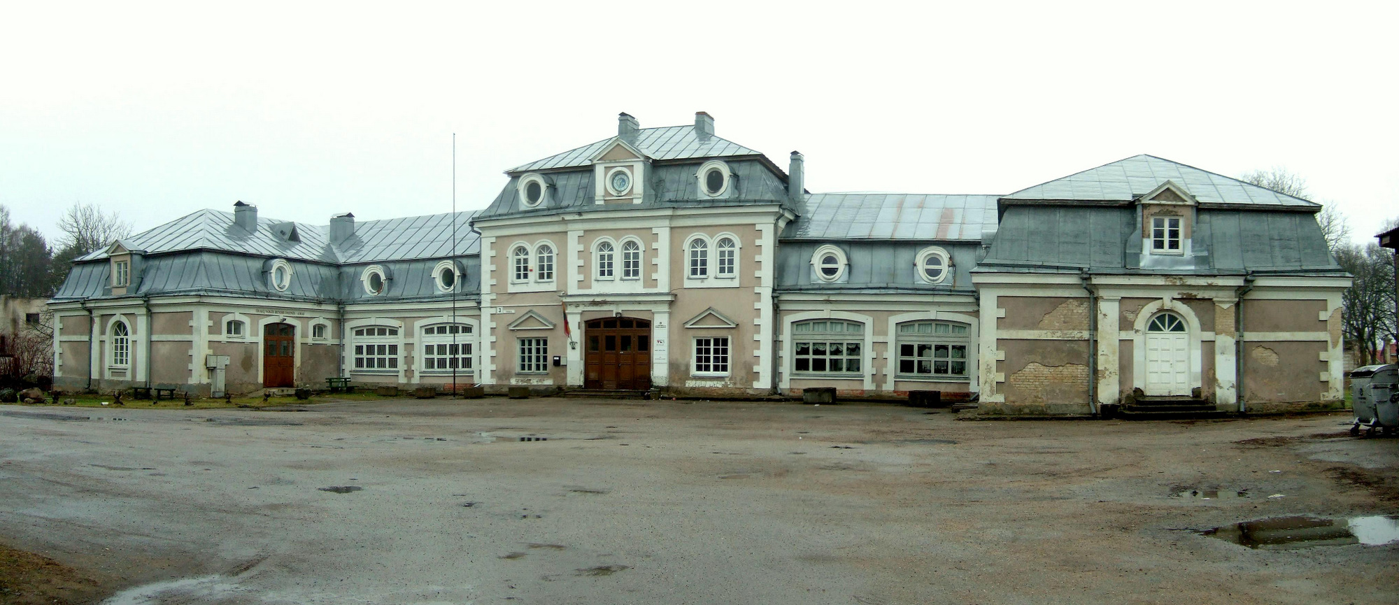 Trakų Vokės dvaro sodybos arklidė; istorizmas, neobarokas